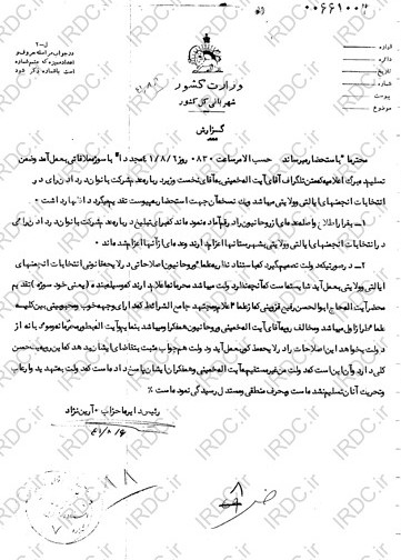 نامه ی دایره احزاب شهربانی كل كشور در خصوص تلگراف امام خمینی به اسدالله علم نخست وزیر